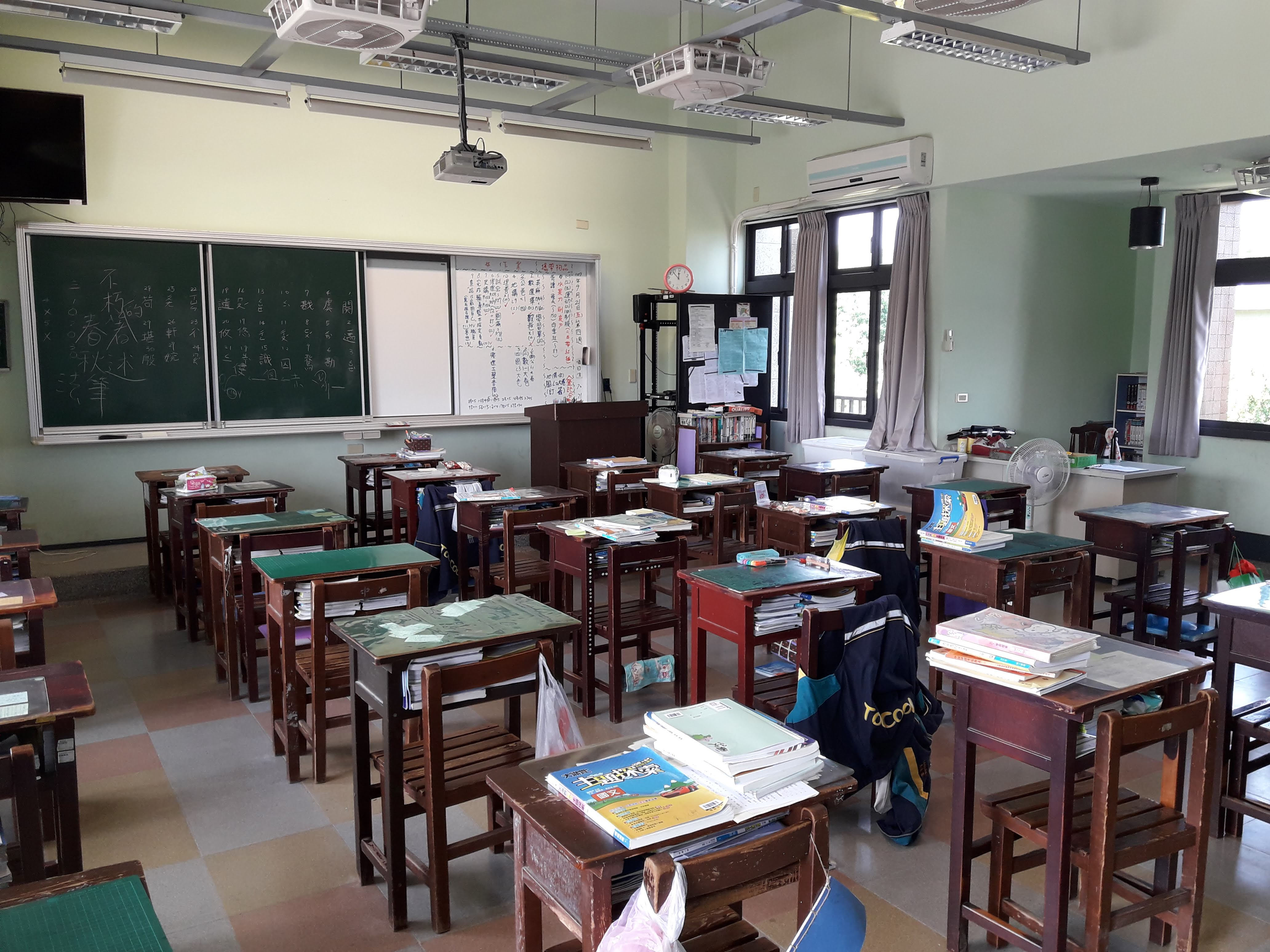 土庫國中勤學樓教室。